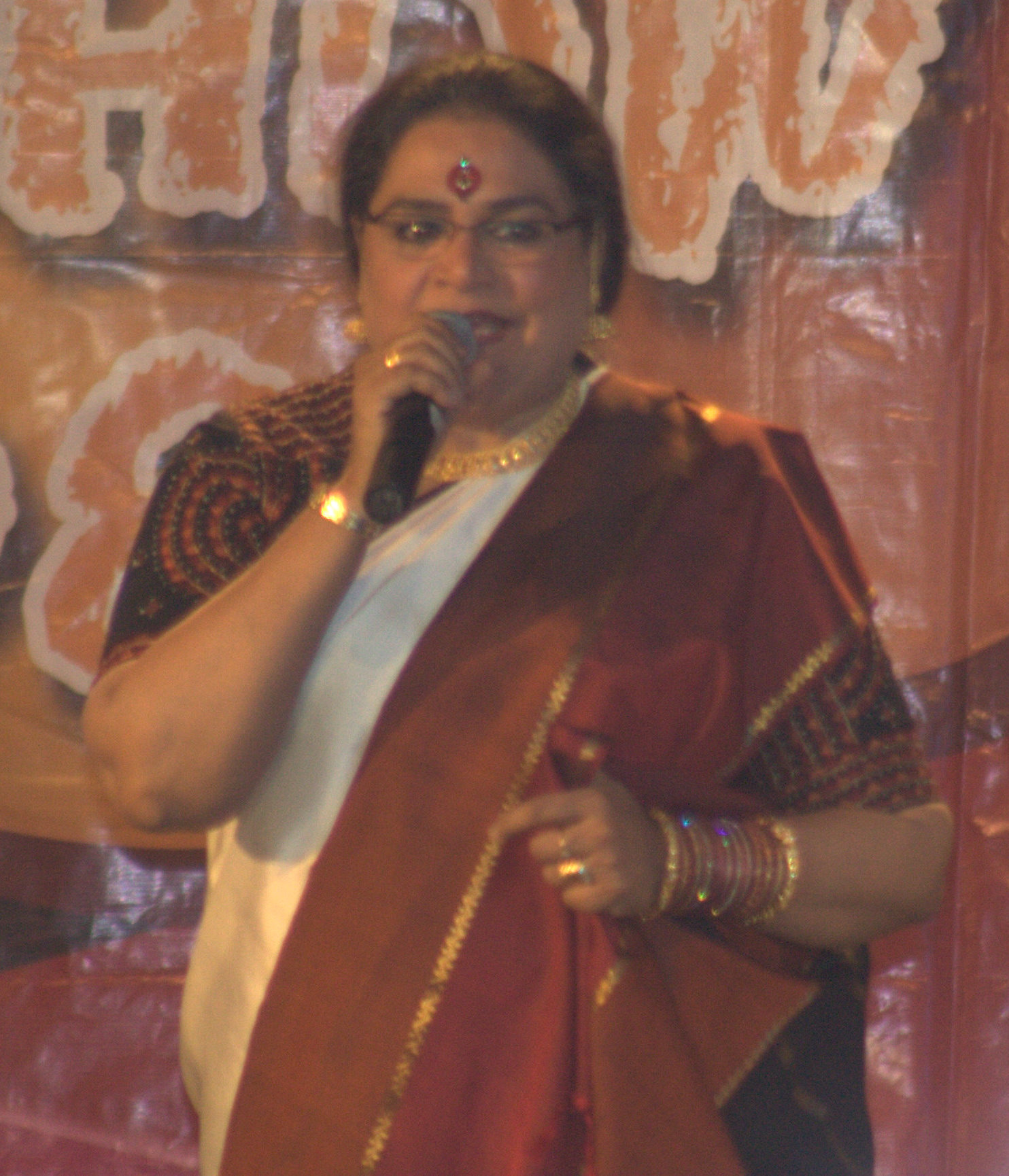 Usha Uthup ( 2008 May )